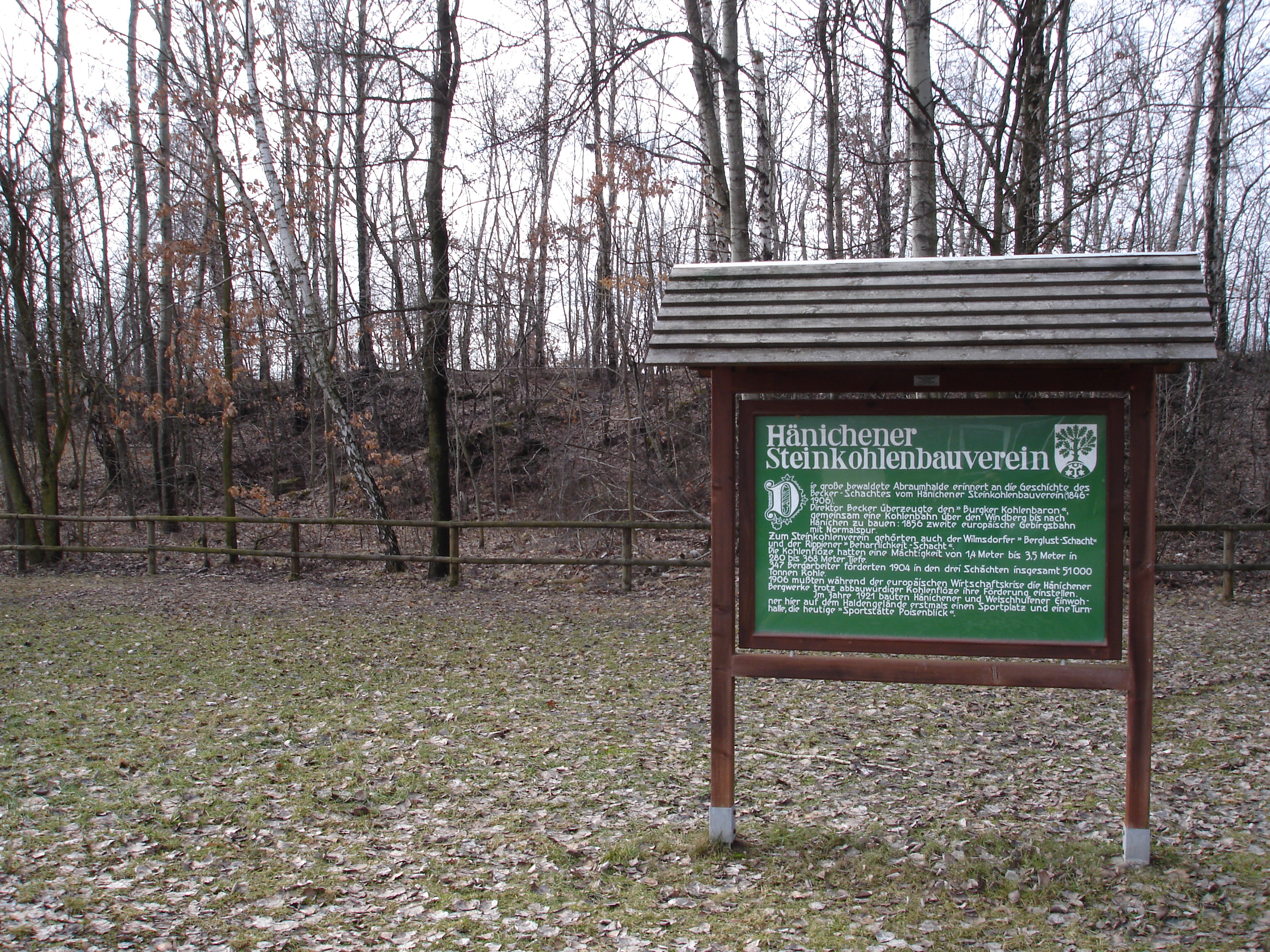 Halde des Beckerschachtes in Hänichen, Gemende Bannewitz